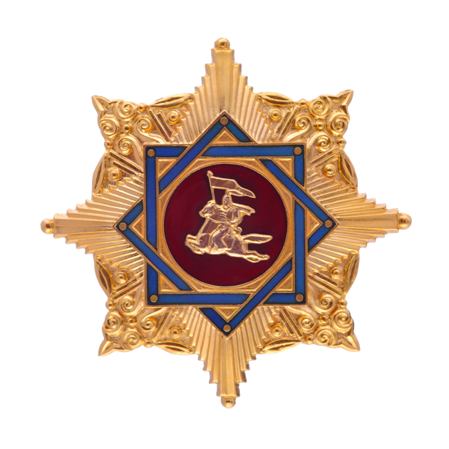 Орден "Манас"